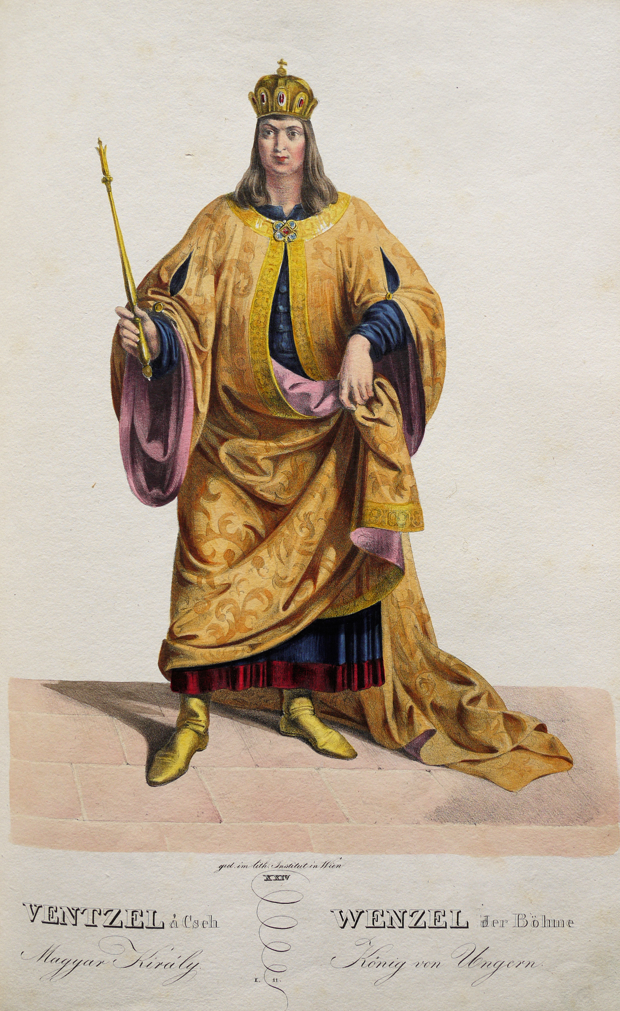 Wenzel III. (1289-1306), König von BÖhmen, Ungarn etc.; Lithographie von Josef Kriehuber nach einer Zeichnung von Moritz von Schwind aus Ungerns Erste Heerführer Herzoge und Koenige In einer Reihe von Bildnissen von Bela bis auf Seine Majestät Franz I. Kaiser Von Österreich König Von Ungern &c., &c. Wien : Lithographisches Institut ;ca. 1828